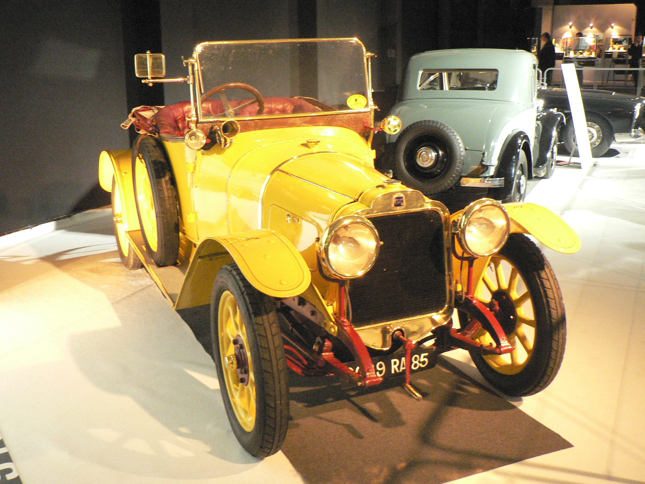 Mors 12 CV Type RX torpedo 4 places 1913 4-cylinders, 2116 ccMondial de l automobile de Paris (October 2006)